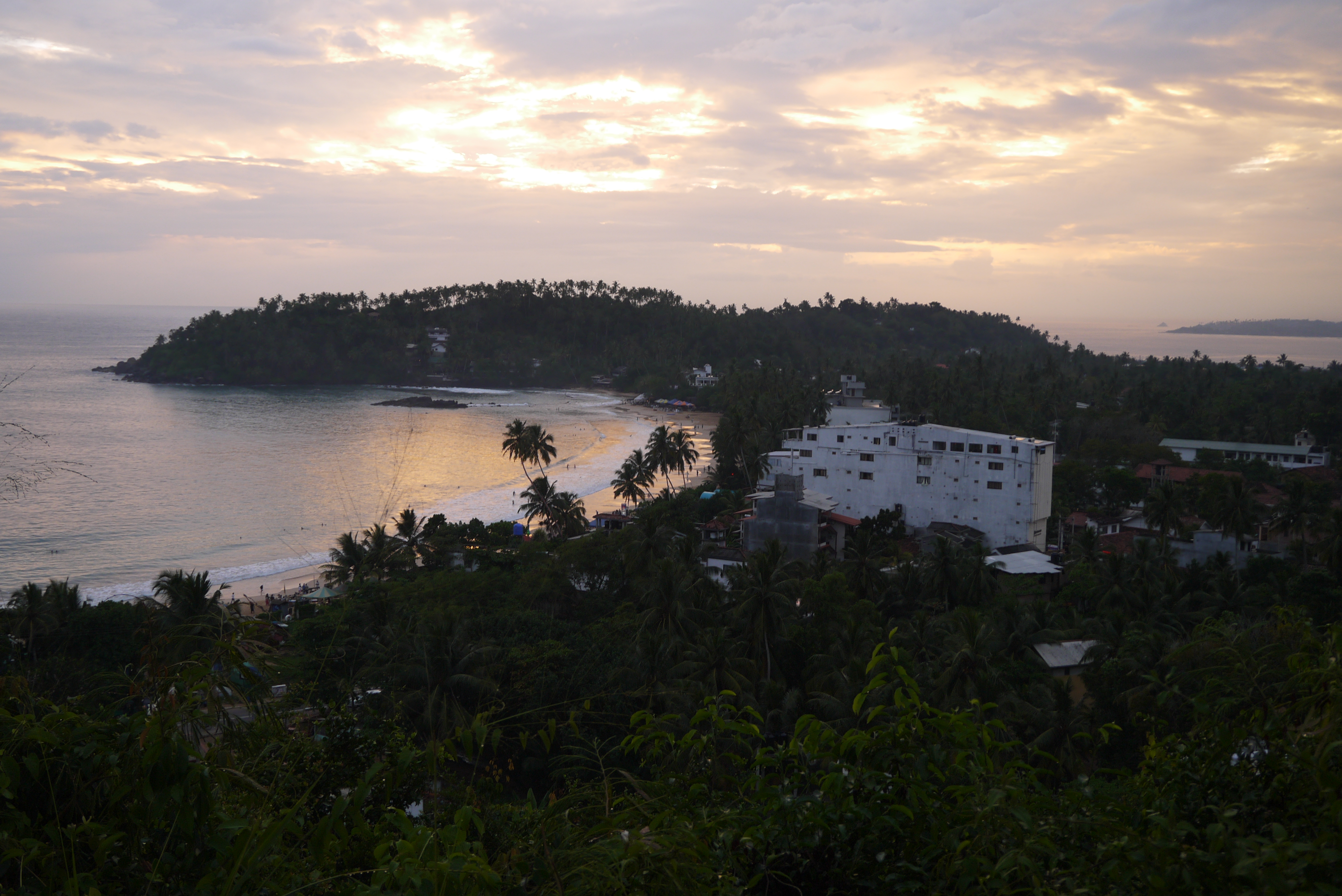 Blick auf die Bucht von Mirissa